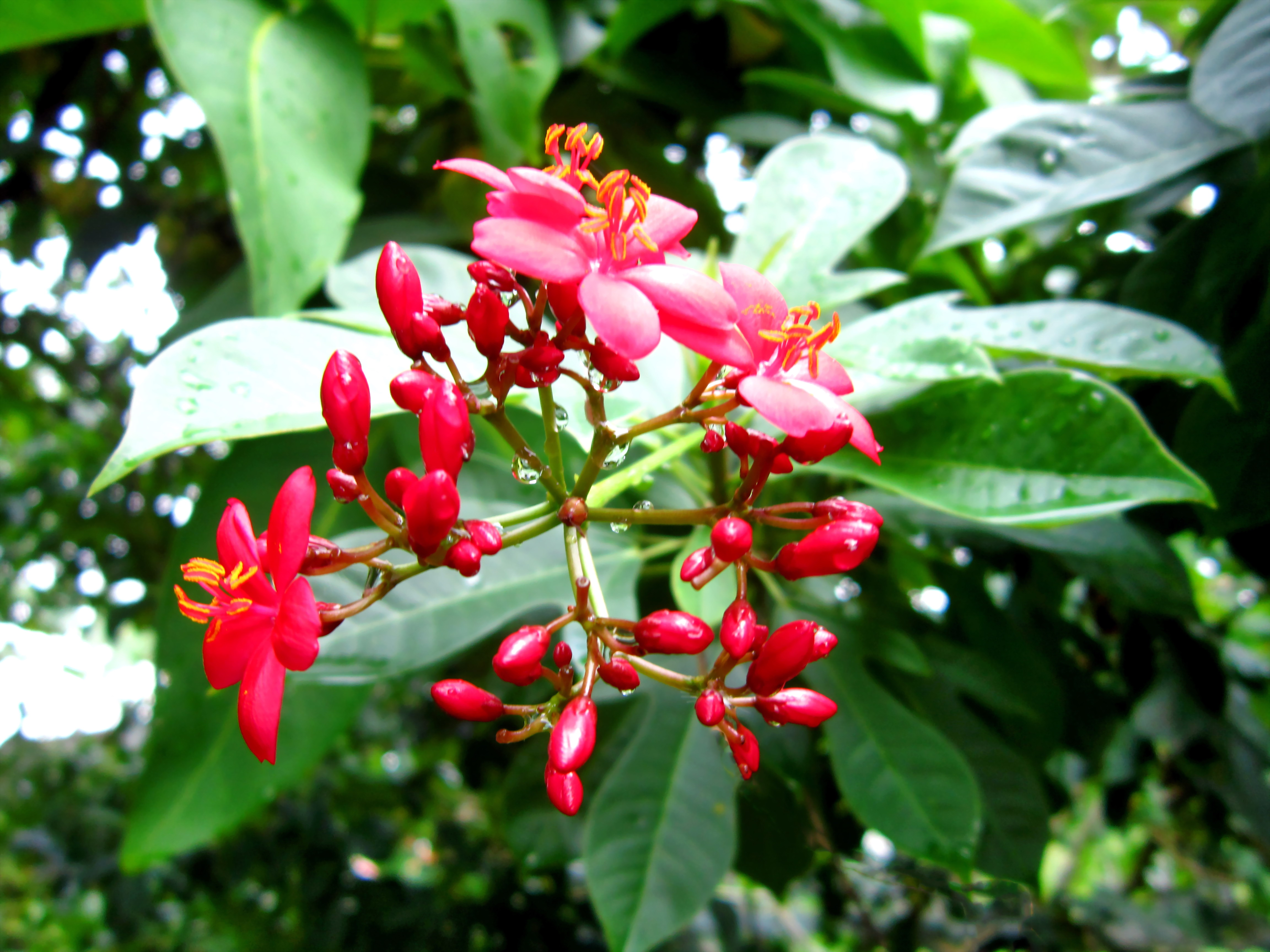 Nhất chi mai còn có tên là Hồng mai,Jatropha pandurifolia. Tên tiếng Anh: Spicy Jatropha, Rose-flowered, Peregrina. Tên Khoa học : Jatropha pandurifolia Andr. Thuộc họ (familia): Euphorbiaceae. Xem: [1]